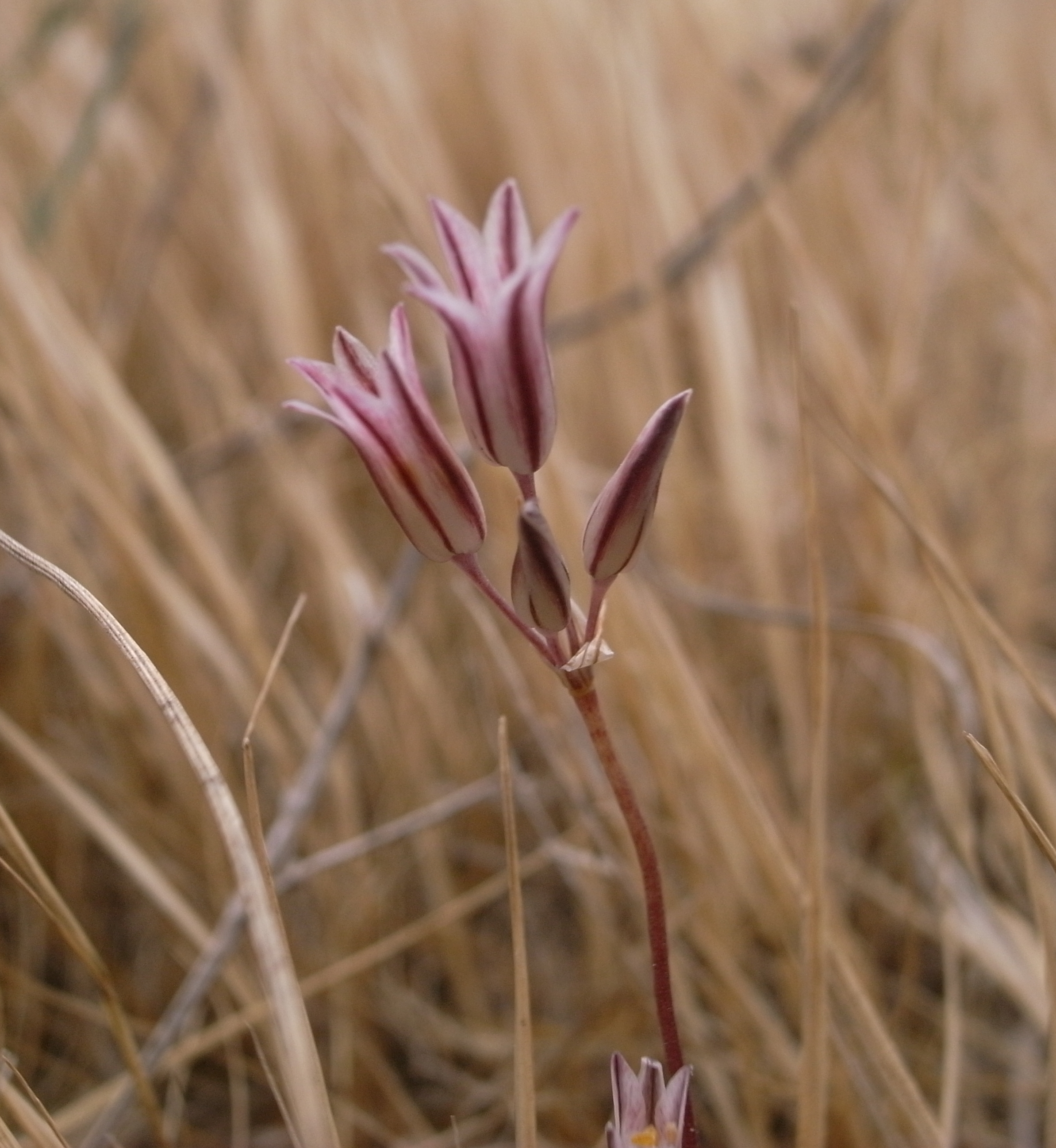 Allium lojaconoi, Dingli Cliffs, Malta